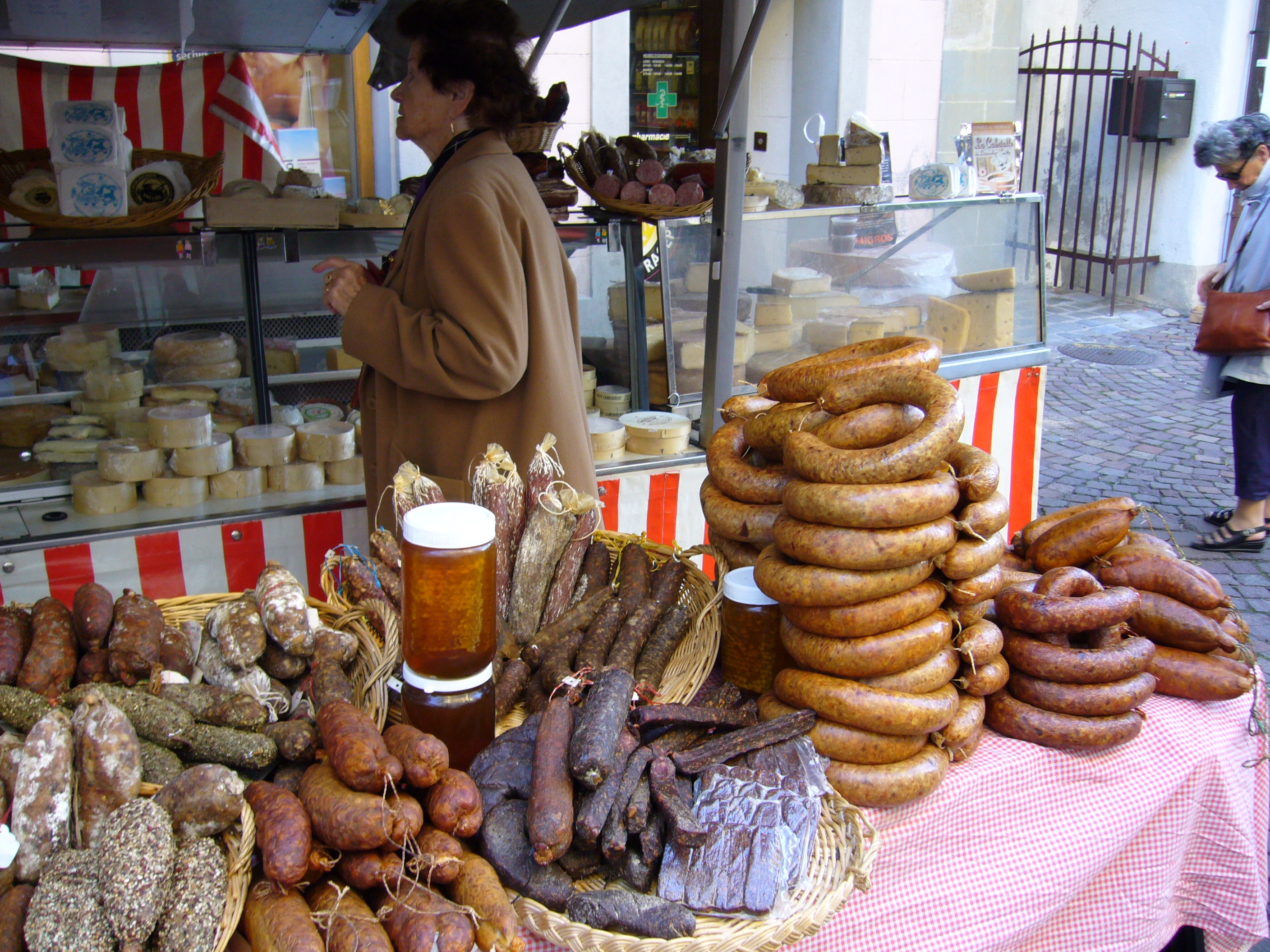 Waadtländer Saucisson, die Wurstspezialität des Kanton Waadt auf dem Samstagsmarkt in Lutry am Genfersee